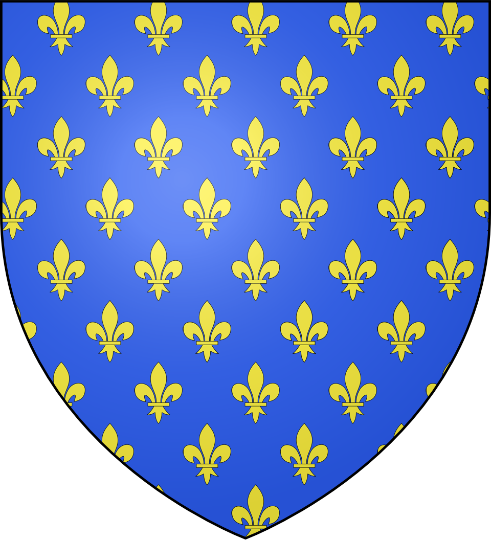 Blason dit "de France ancien" : d'azur semé de fleurs de lys d'or